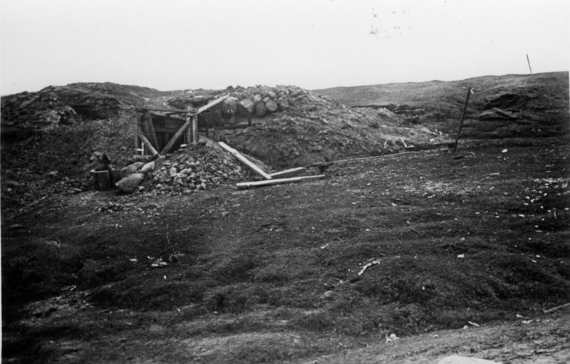 Russland, Cholm, Vorposten-Bunker Scherl: An der Sowjetfront: Der Wehrmachtsbericht gab die Entsetzung eines vorgeschobenen deutschen Stützpunktes an der Ostfront bekannt, der über drei Monate lang von allen Verbindungen abgeschnitten war. In solchen Bunkern hausten unsere Soldaten über 3 Monate. In der kältesten Zeit des Jahres trotzten sie hier einem Gegner, der ihnen zahlenmässig weit überlegen war. MPK-Aufnahme: Kriegsberichter v. Persan 3394-42 Mai 42 [Herausgabedatum]